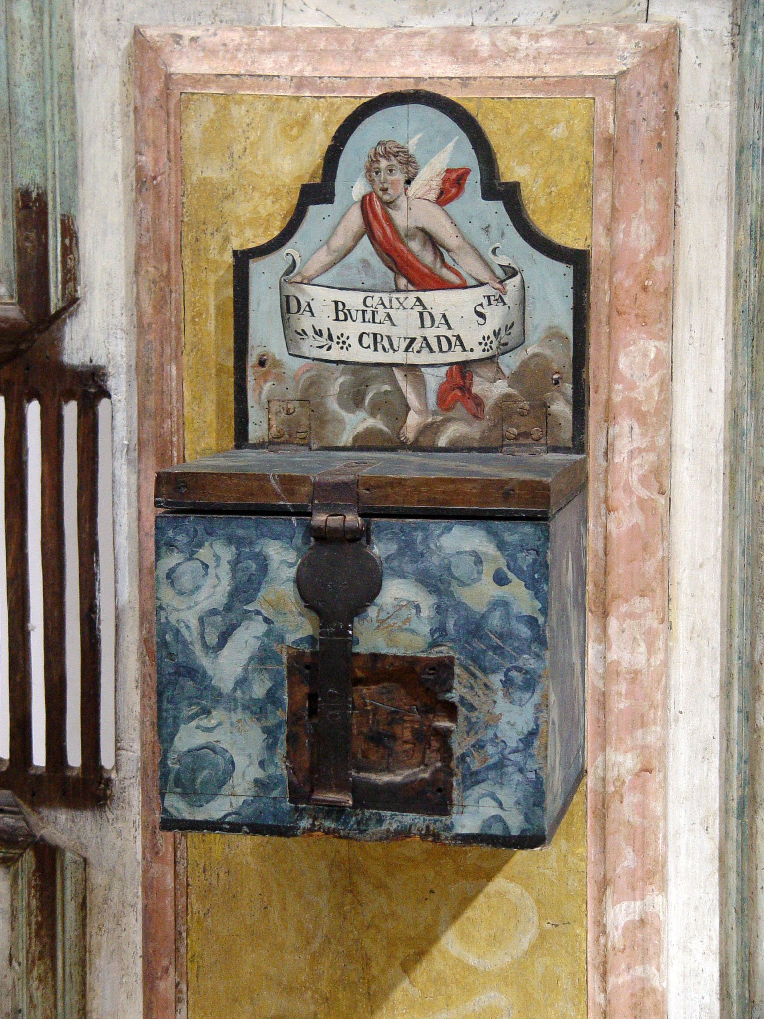 O Mosteiro do Pombeiro e a sua Igreja estão classificados como Monumento Nacional, e o conjunto igreja/mosteiro constitui um belo e importante exemplar da arquitectura românica e setecentista.